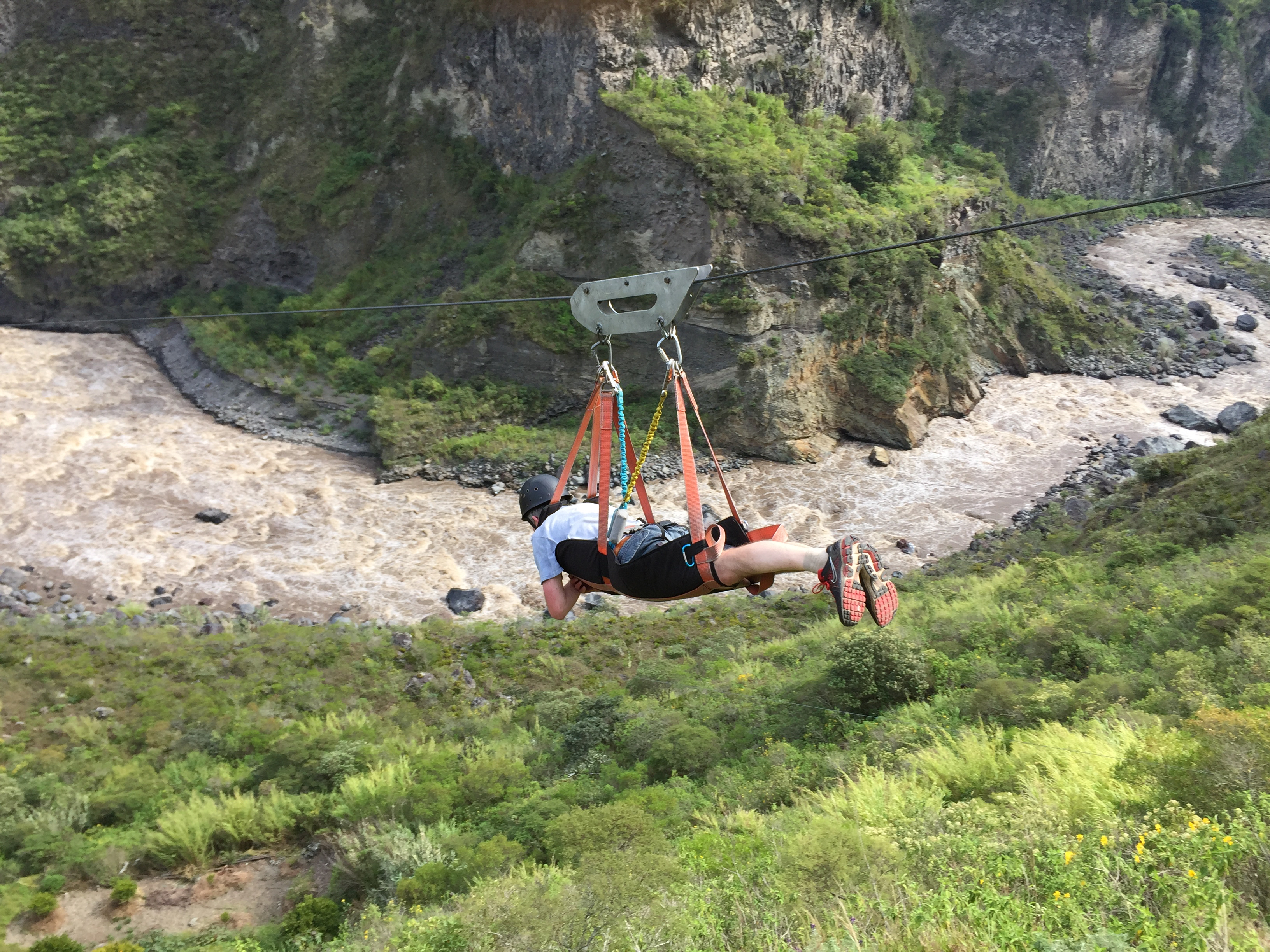 Seilrutsche (span: Canopy) ins Pastazatal, am Stadtrand von Baños, Ecuador